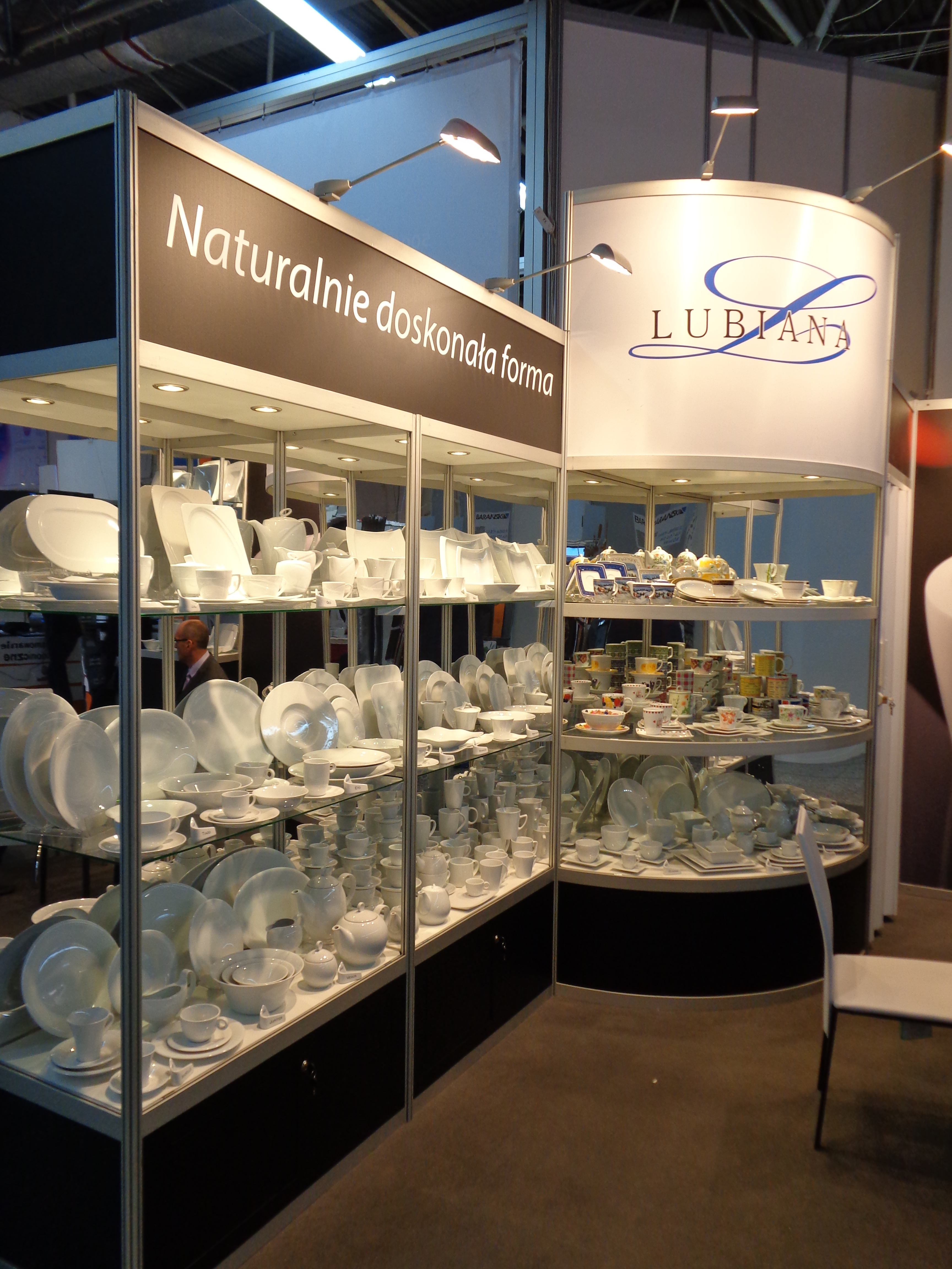 Porcelana "Lubiana" prezentowana podczas Targów HORECA 2013 w Krakowie.